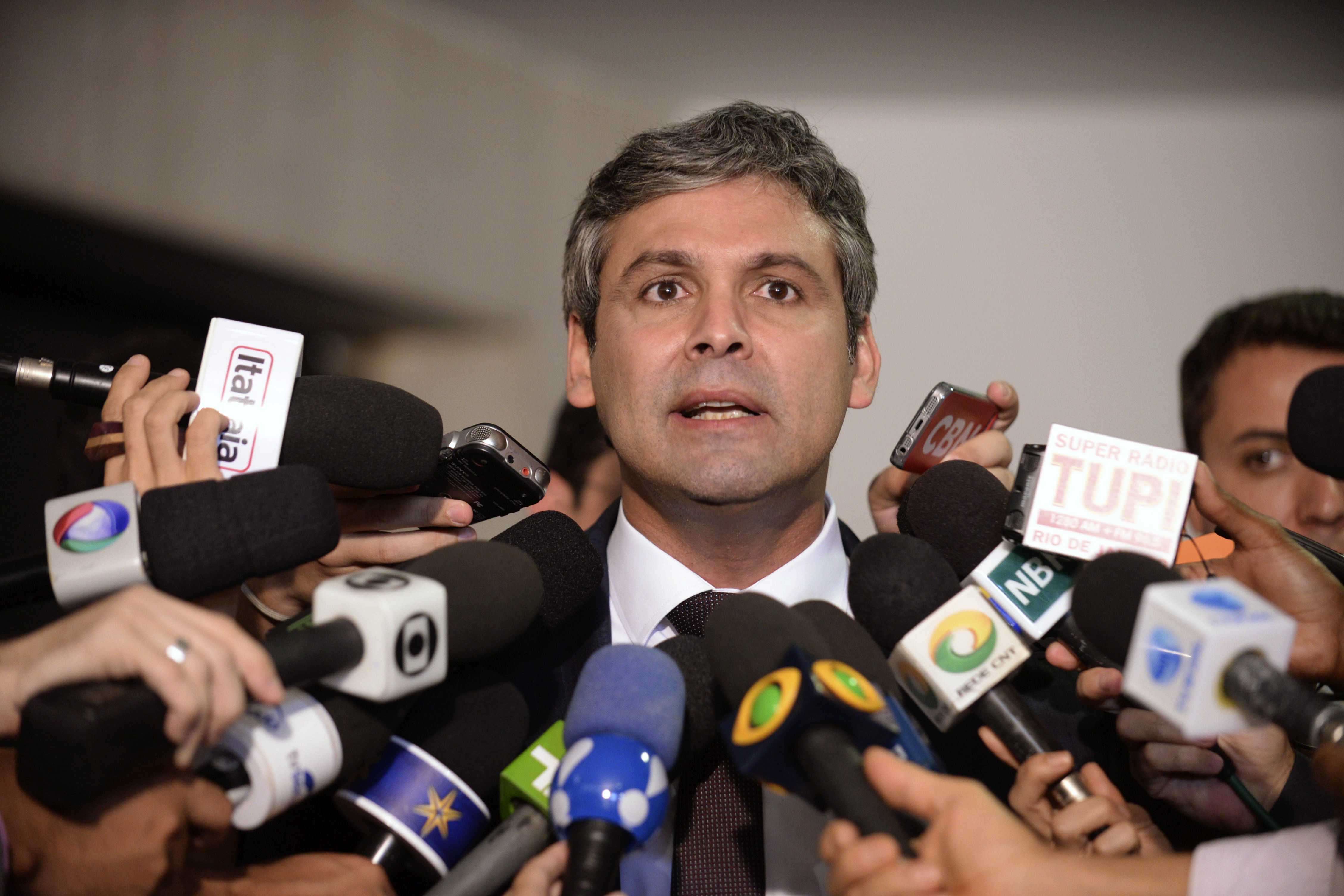 Senador Lindbergh Farias (PT-RJ) concede entrevista Foto: Jefferson Rudy /Agência Senado